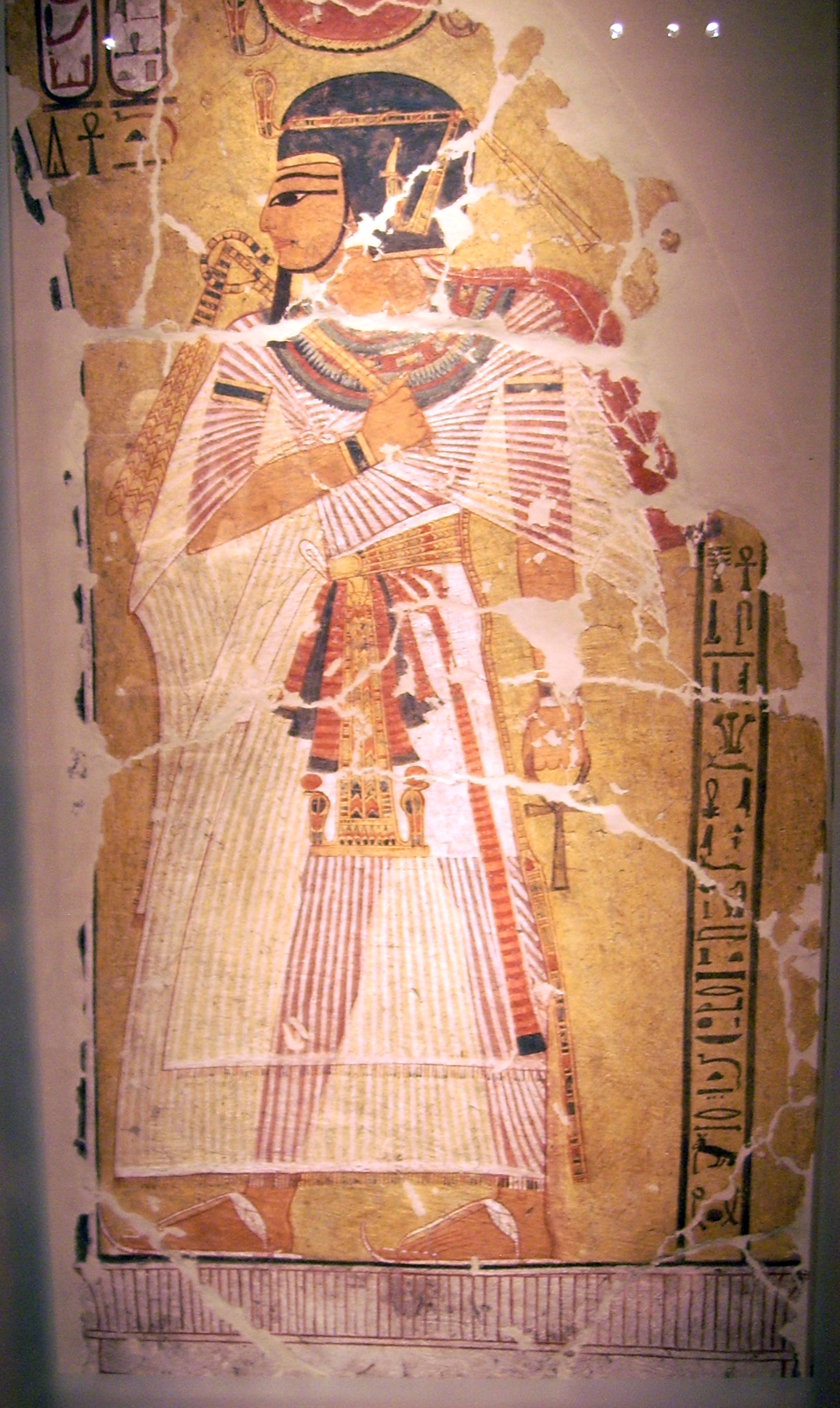 Wandmalerei aus einem Grab: Amenophis I.; Neues Reich, 20. Dynastie, um 1190/80 v. Chr.; Malerei auf Nilschlammputz; Inv.-Nr. 2081 - Ägyptisches Museum Berlin/Altes Museum